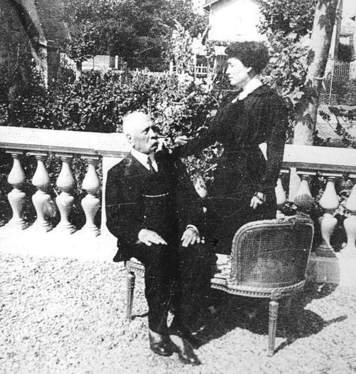 El General don Porfirio Díaz y su esposa doña Carmelita Romero Rubio en París, Francia.